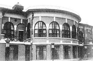 英国乡谊俱乐部主楼